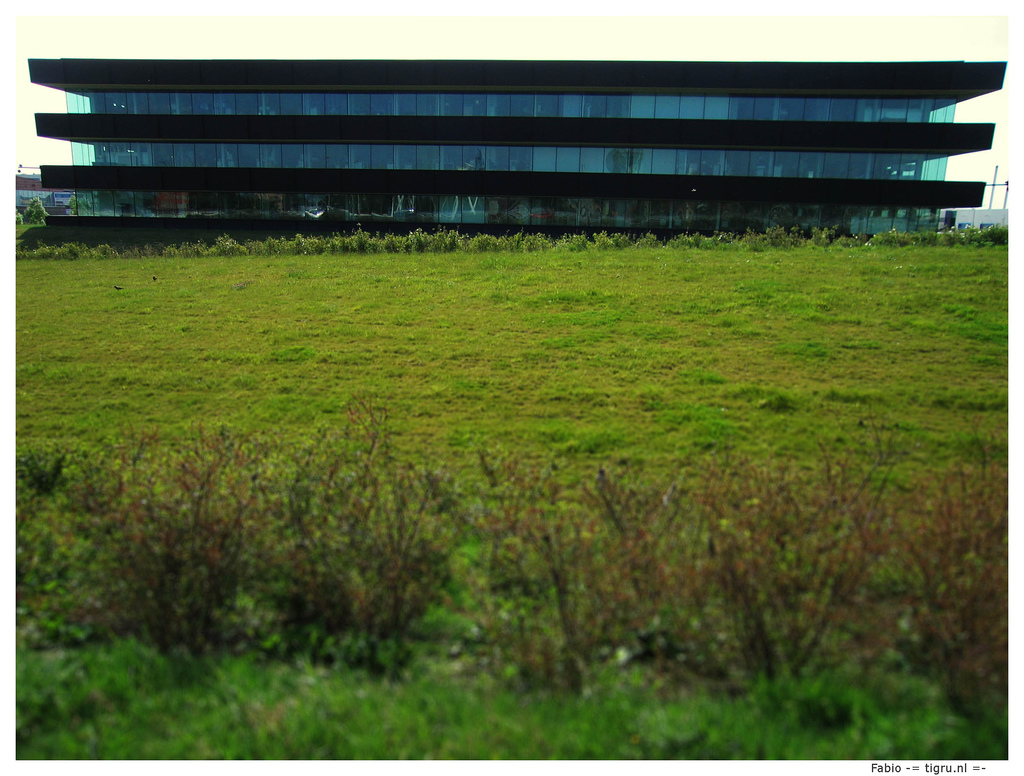 Nederlands Forensisch Instituut - Fietstocht / randwandeling 'Langs de randen van Ypenburg'. Ik zet 'm ook in een Google Maps.